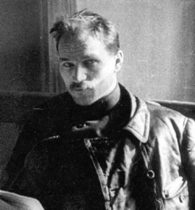 Фёдор Сергеев